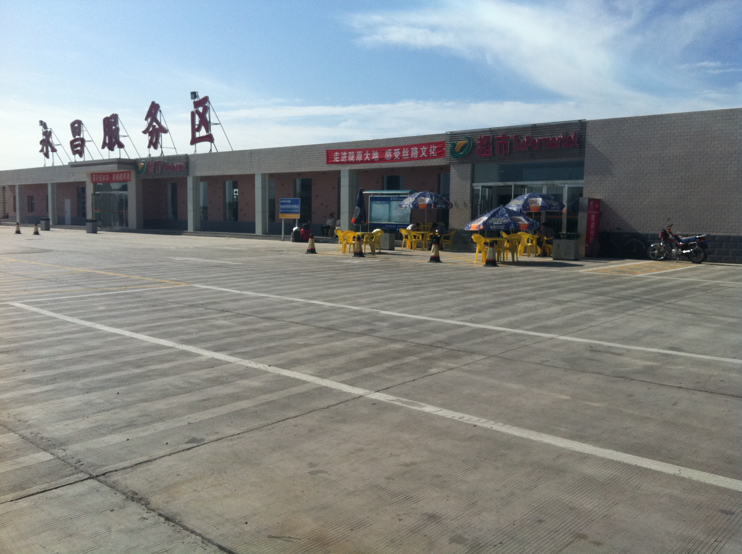 Yongchang, Jinchang, Gansu, China